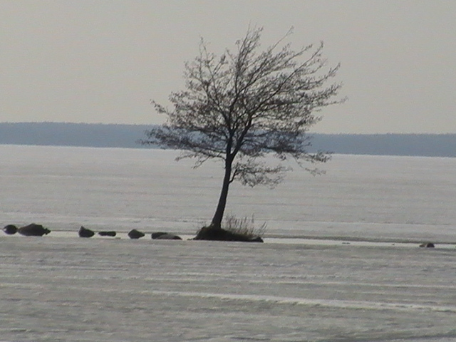 Yksinäinen puu Pihlavan saaren vieressä Säkylässä.